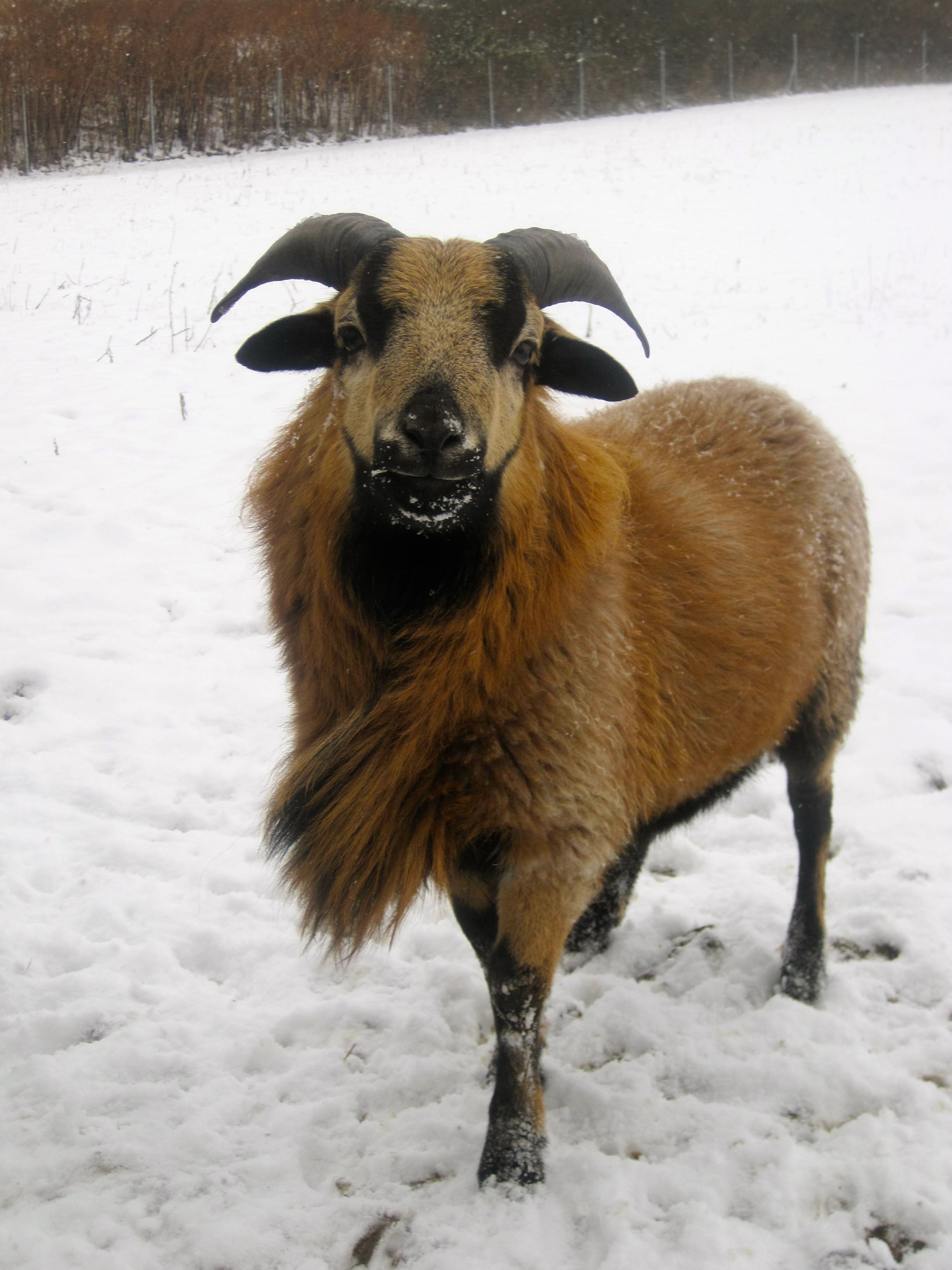 Kamerunschaf im Tiergehege Schönkirchen